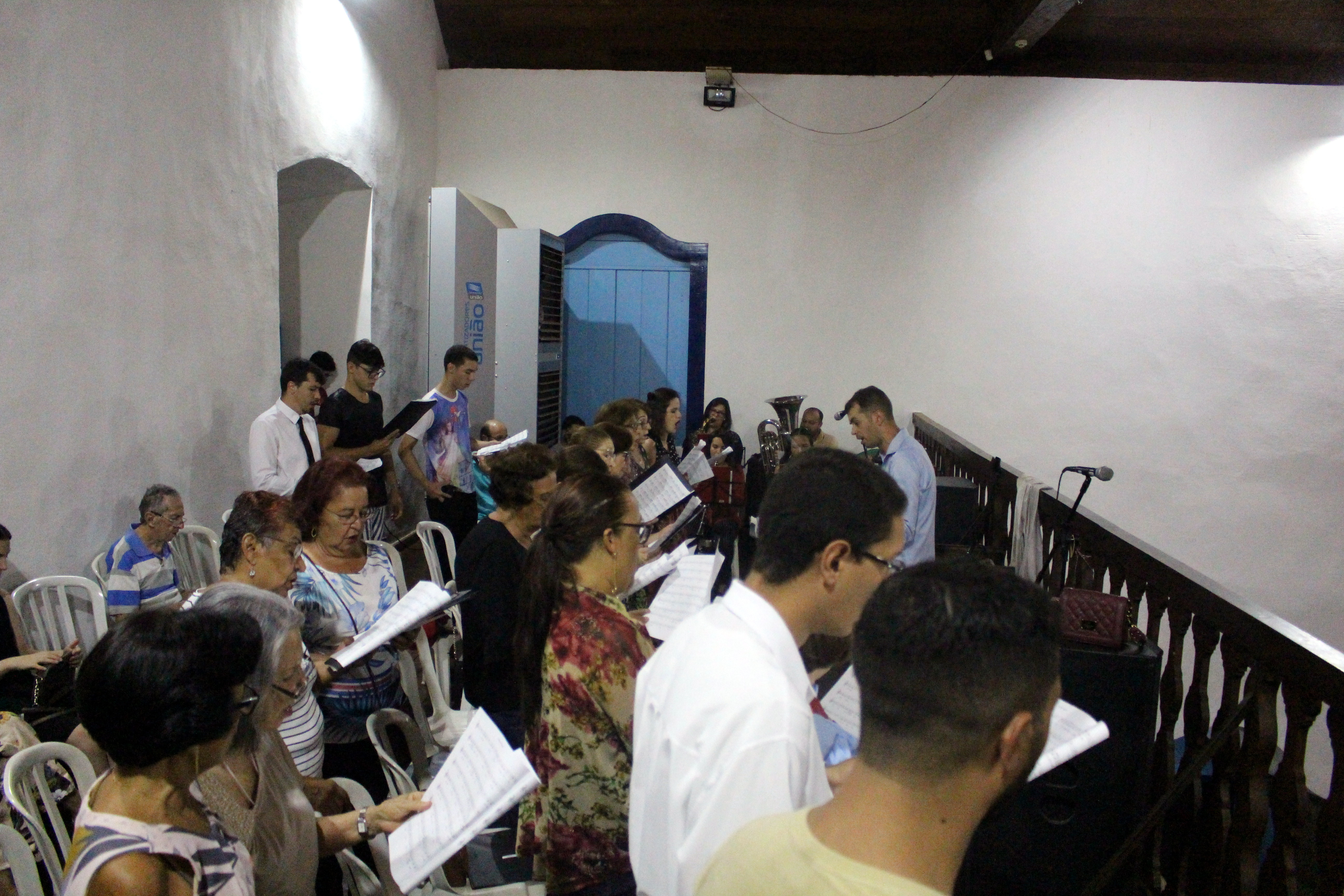 Atuação do Coro e Orquestra Nossa Senhora do Rosário na Igreja Matriz de Pirenópolis, durante a Festa do Rosário